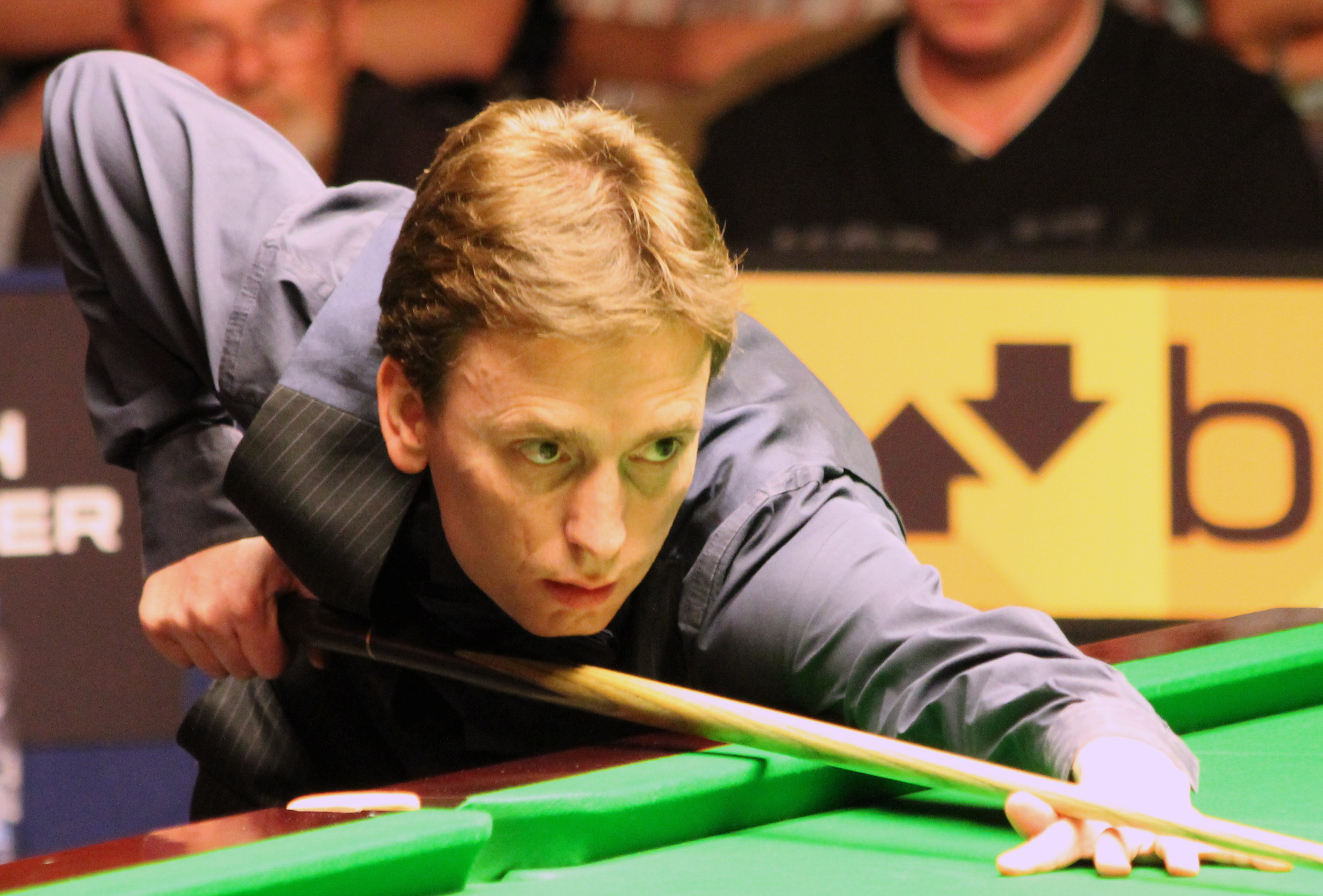 Ken Doherty beim Paul Hunter Classic 2012